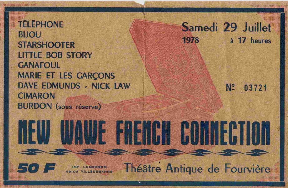 Billet papier du concert indiquant le prix (50 francs) et le nom des groupes présents : Téléphone, Bijou, Starshooter, Little Bob Story, Ganafoul, Marie et les Garçons, Dave Edmunds, Nick Law, Cimaron et Burdon (sous réserve)